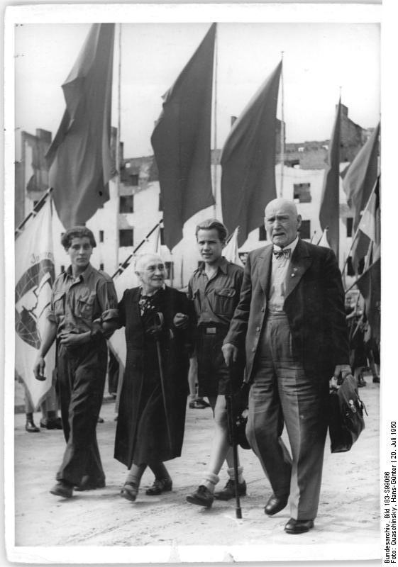 III.Parteitag der SED vom 20.-22.7.1950. Vom 20.-22.7.1950 findet in Berlin in der Werner-Seelenbinderhalle der III.Parteitag der Sozialistischen Einheitspartei Deutschlands statt. Die Partei-Veteranin Luise Kaehler nimmt ebenfalls am Parteitag teil. Aufn.: Illus-Quaschinsky Be. 7294-50 8 20.7.50